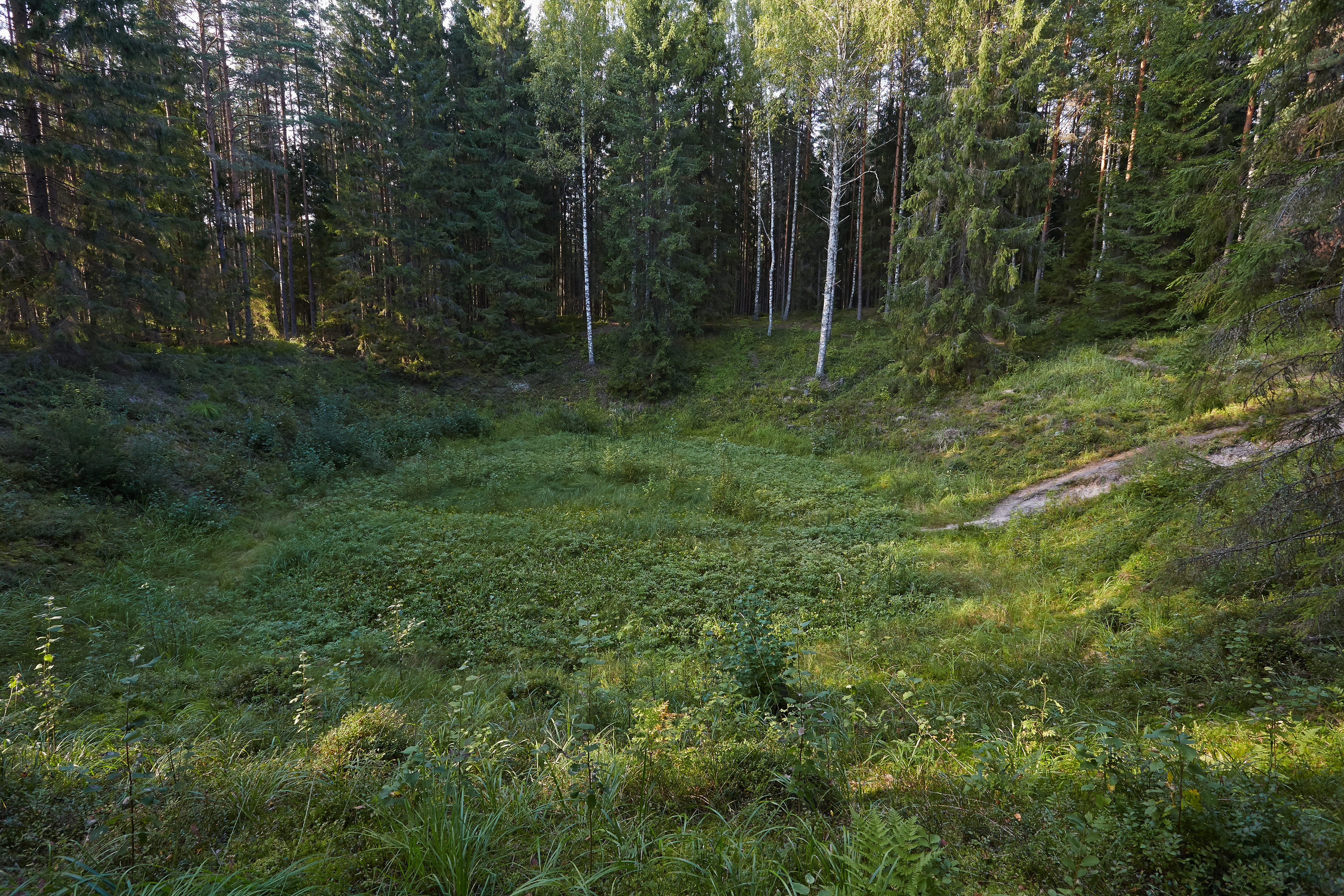 Ilumetsa meteoriidikraatritest suurim, Põrguhaud